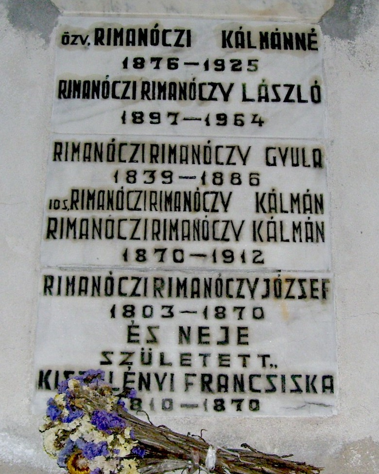 Rimanóczy-emléktábla a Barátok temploma kriptájában, Nagyvárad (tervezte ifj. Rimanóczy Kálmán)